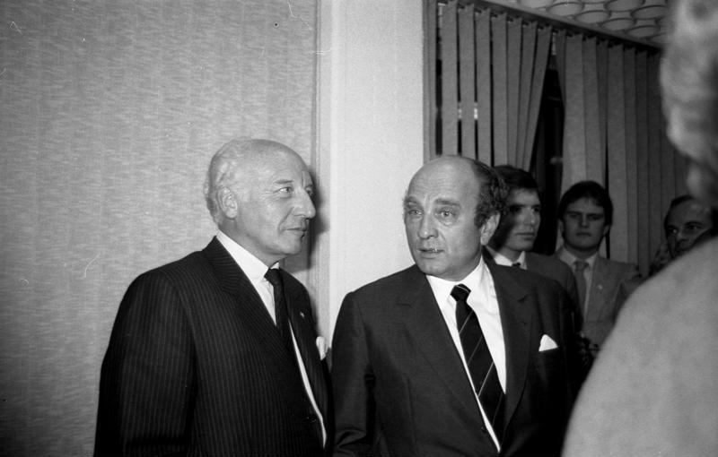 Bundestagswahl: F.D.P.-Wahlparty im Thomas-Dehler-Haus in Bonn.